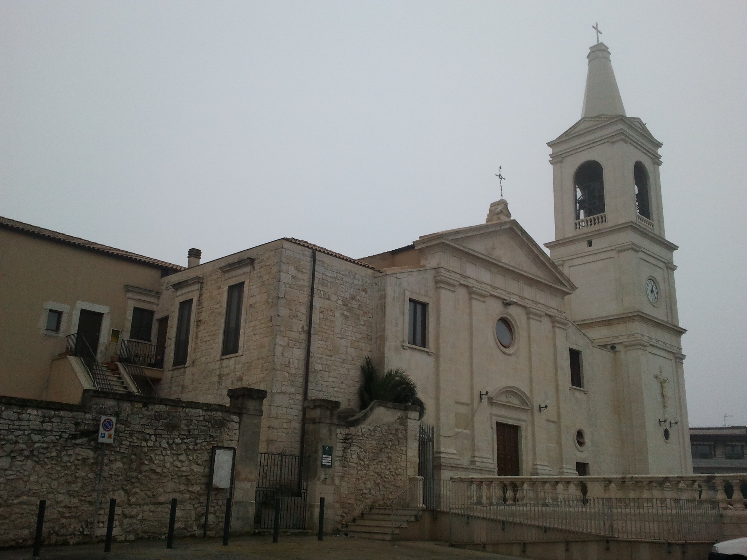 Croce del santissimo Crocifisso a Santeramo in Colle